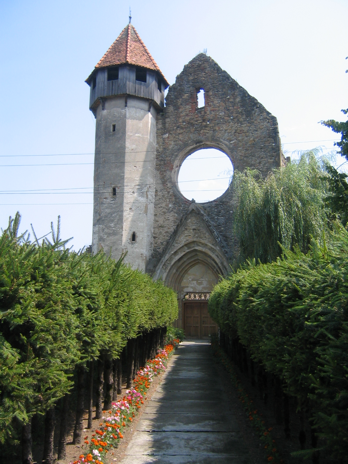 Carta Monastery